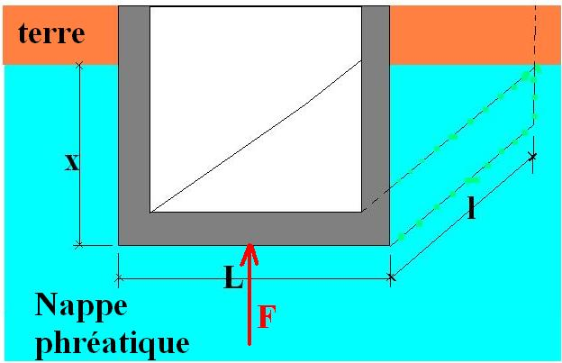 Schéma de la poussée d'Archimède sur un cuvelage.